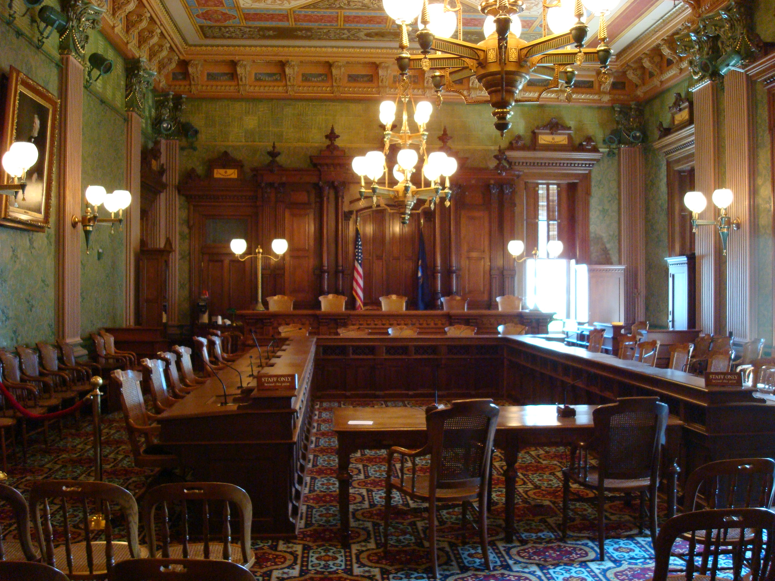 Michigan Capitol